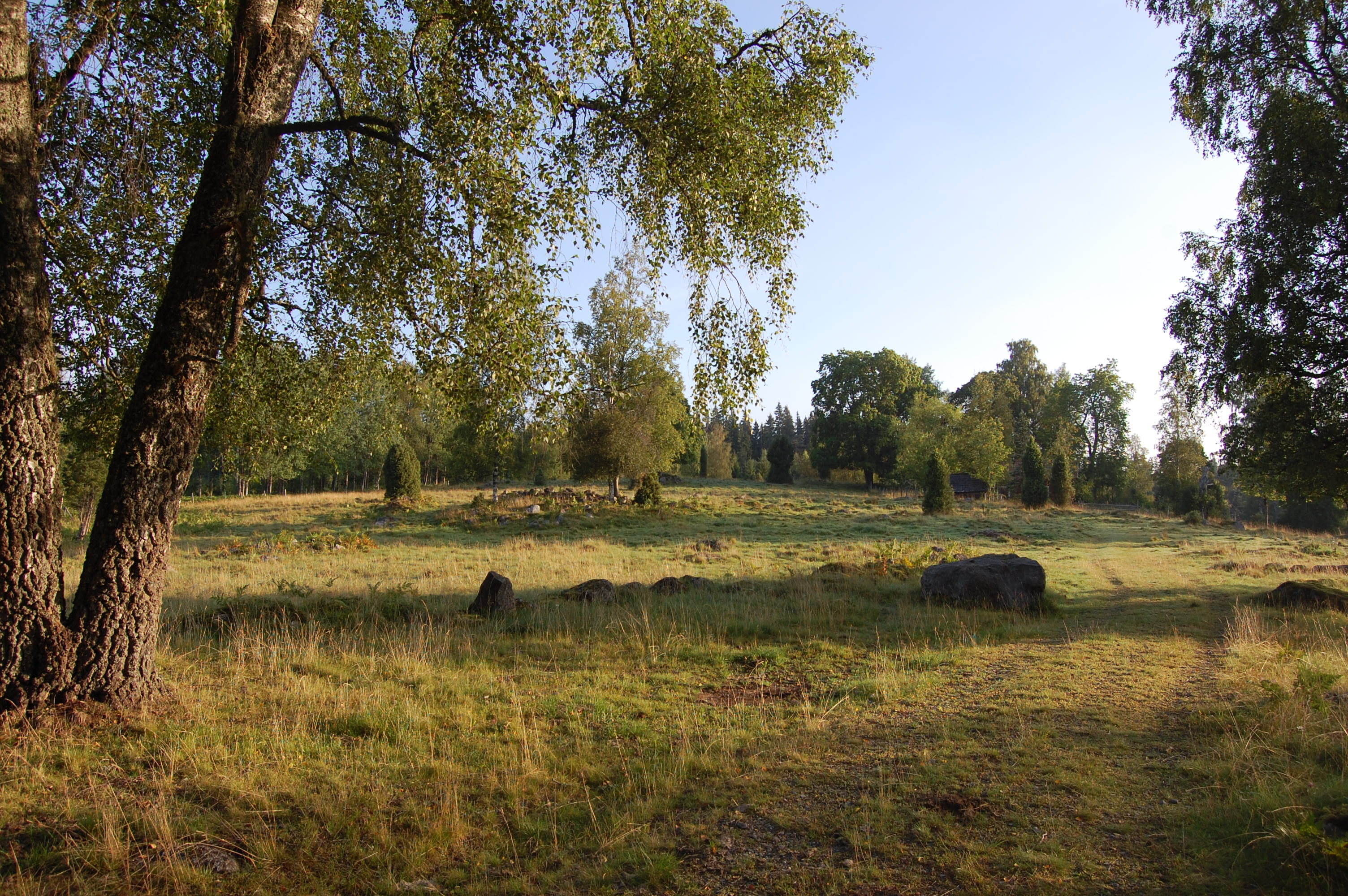 Skraperstad gravfält, RAÄ-nummer Vallsjö 34:1